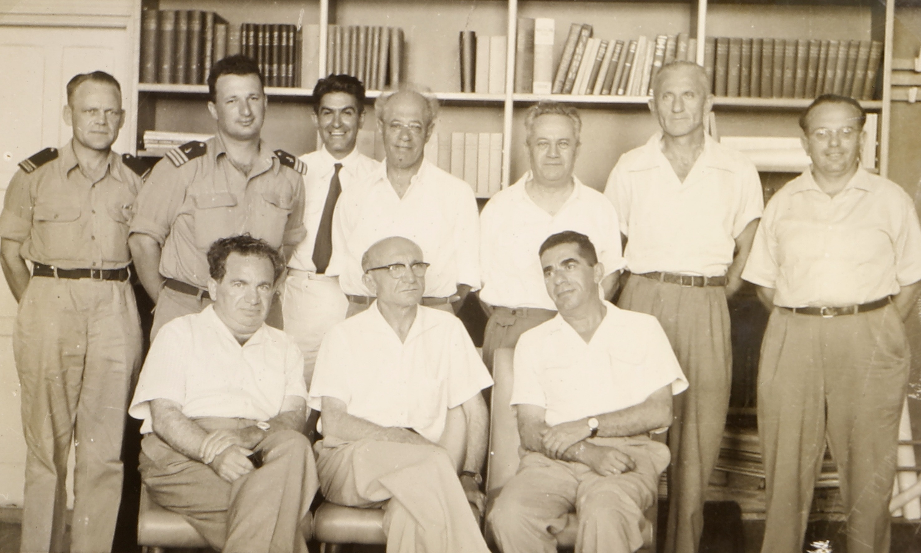 הסגל הבכיר של בית הספר לקציני ים יחד עם הדירקטוריון.